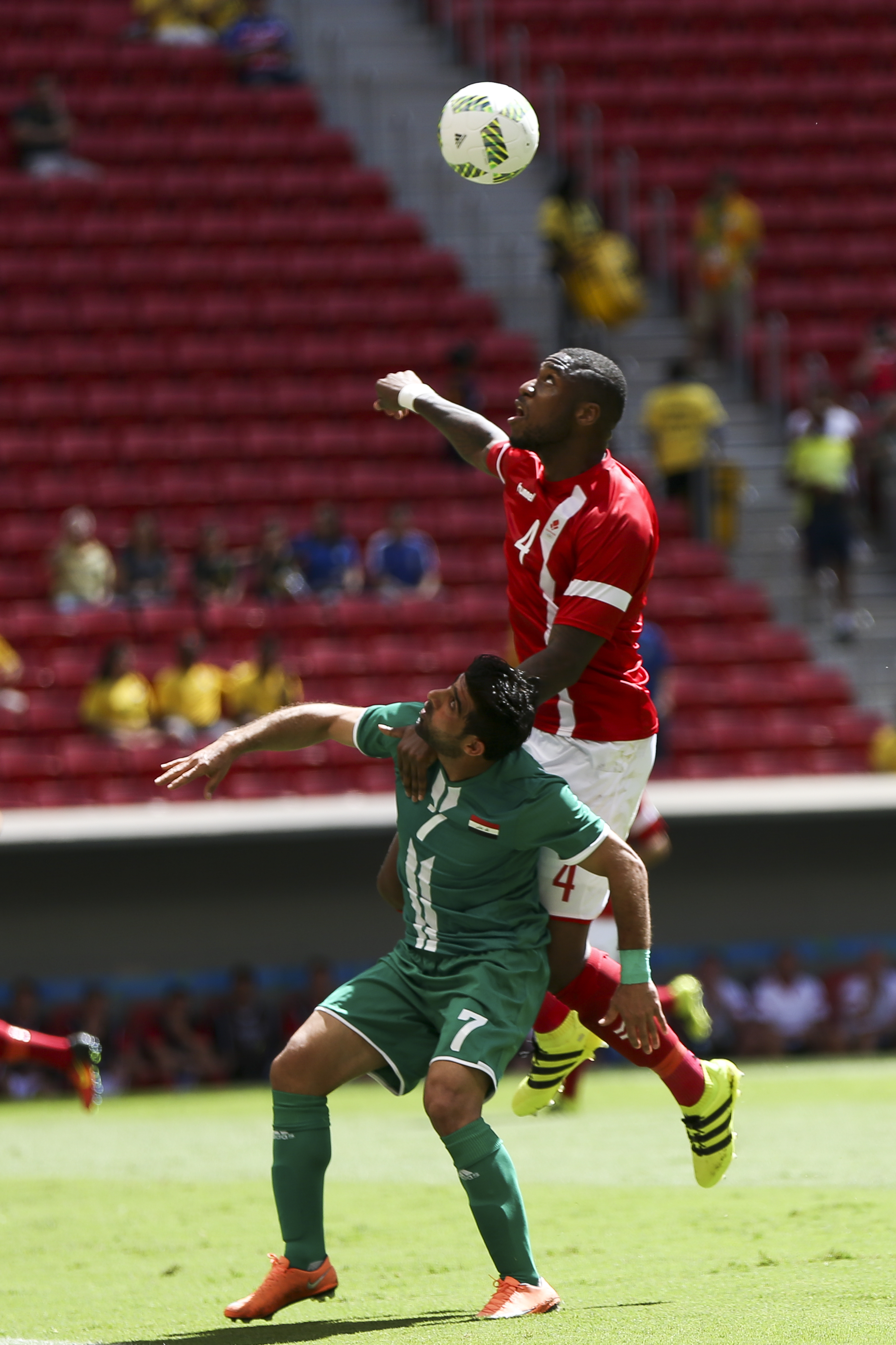 Brasília - A seleção do Iraque enfrenta a seleção da Dinamarca pela primeira fase do futebol olímpico, no estádio Mané Garrincha ( Marcelo Camargo/Agência Brasil)